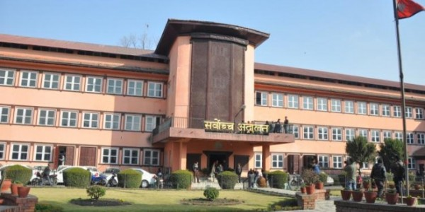 नेपाली: नेपालको सर्वोच्च अदालतको भवन